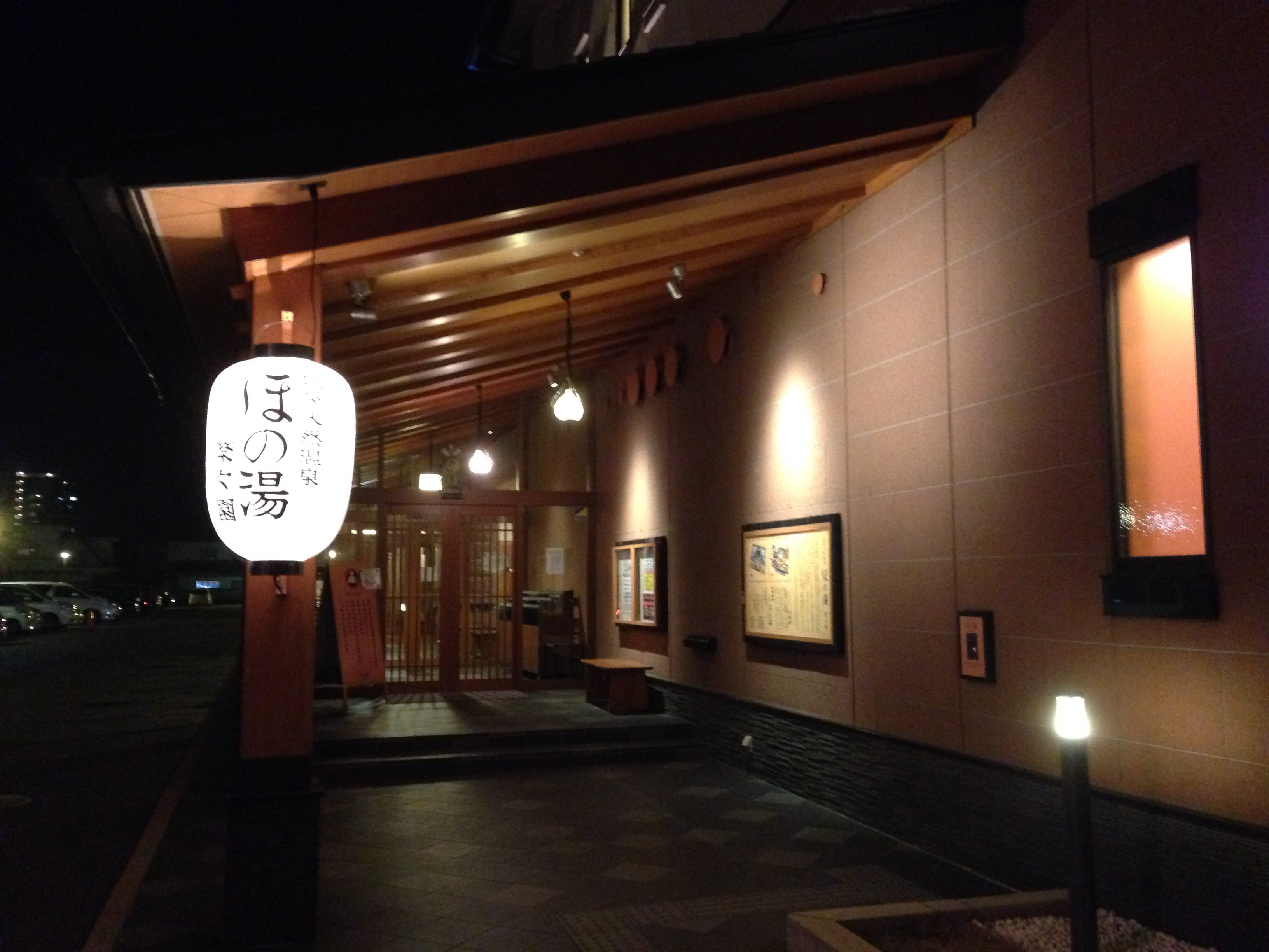 塩屋天然温泉 ほの湯 楽々園の入り口。